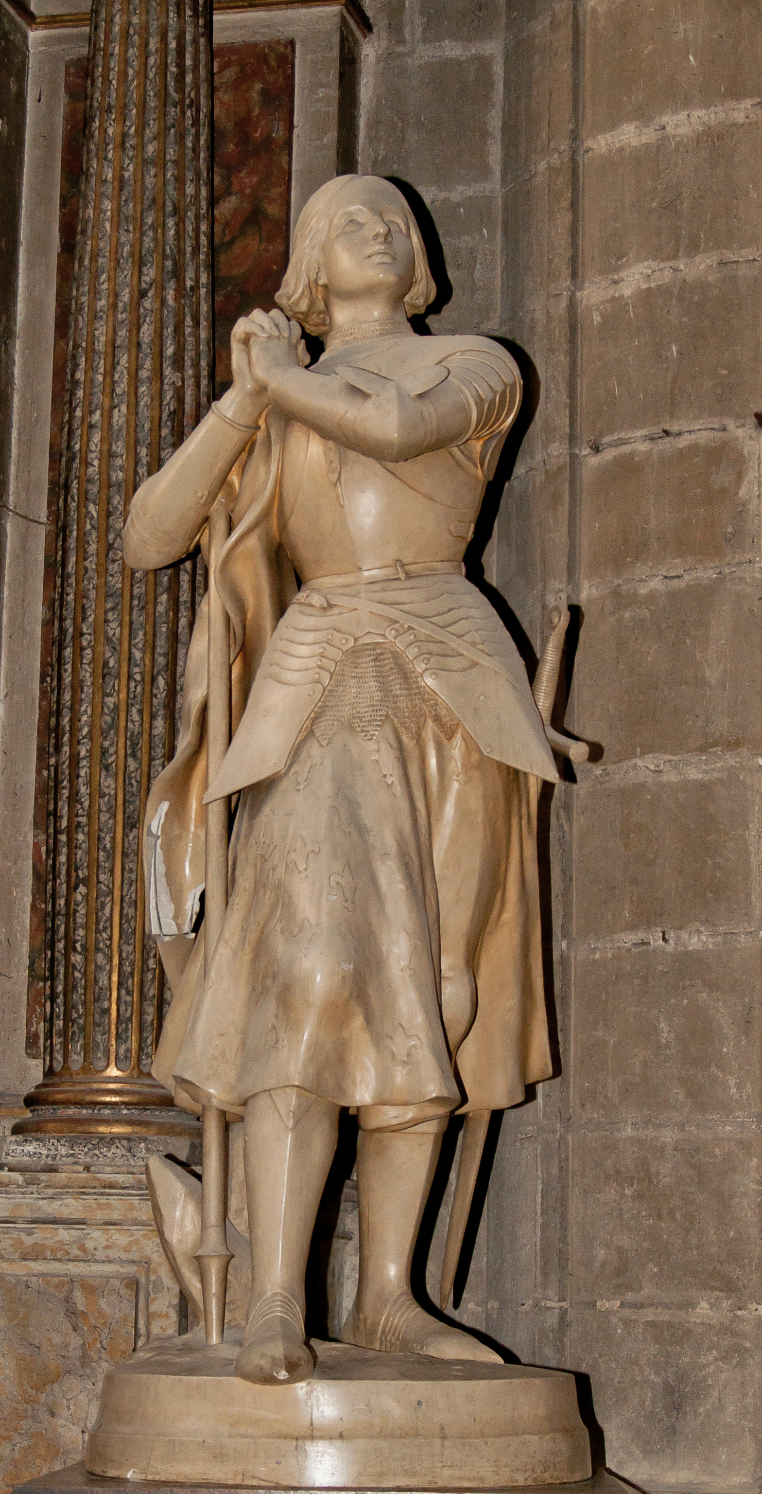 Statue de Jeanne d'Arc par Charles Desvergnes, en la Cathédrale d'Auch